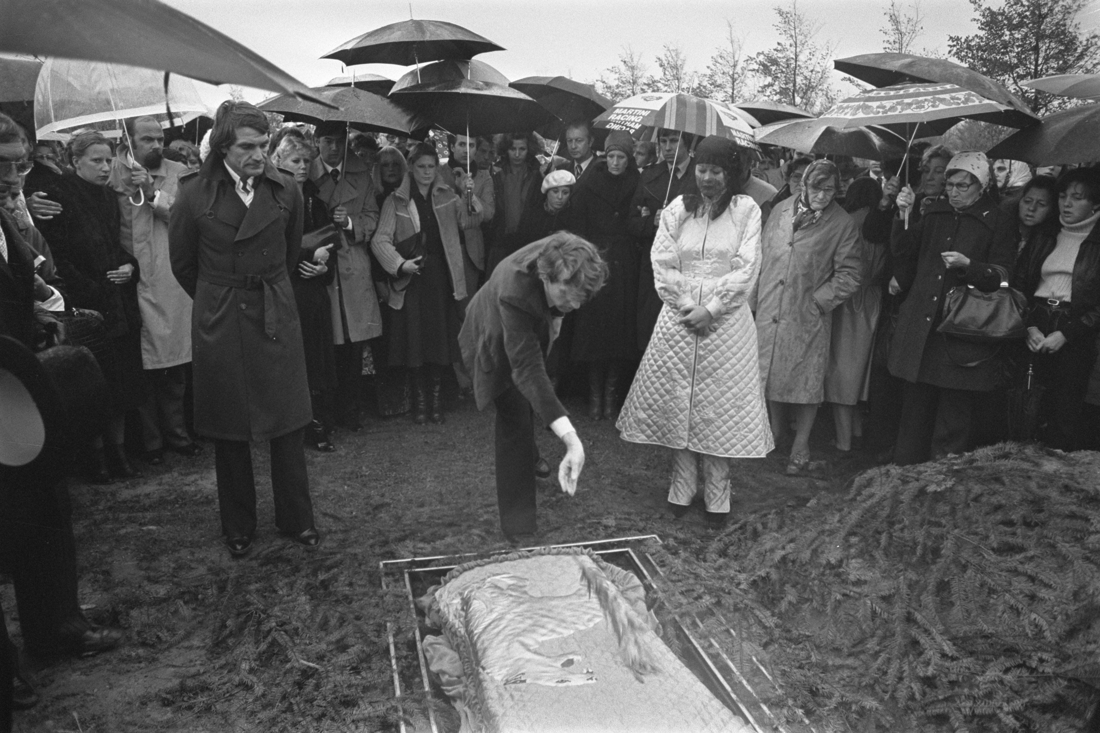 Collectie / Archief : Fotocollectie Anefo Reportage / Serie : [ onbekend ] Beschrijving : Begrafenis van Mathilde Willink, rechts mode-ontwerpster Fong Leng Datum : 31 oktober 1977 Trefwoorden : begrafenissen Persoonsnaam : Fong Leng Fotograaf : Verhoeff, Bert / Anefo Auteursrechthebbende : Nationaal Archief Materiaalsoort : Negatief (zwart/wit) Nummer archiefinventaris : bekijk toegang 2.24.01.05 Bestanddeelnummer : 929-4158